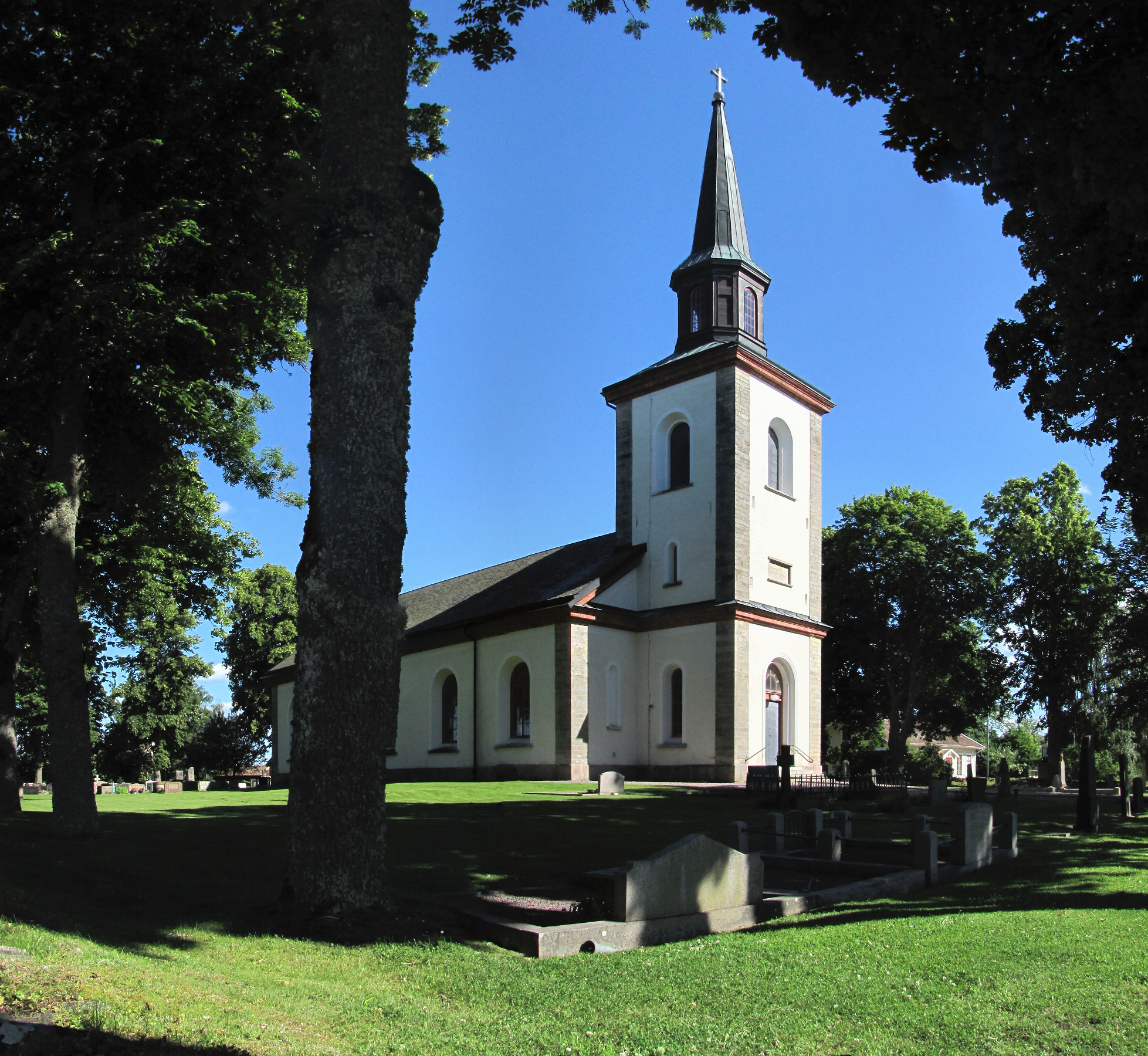 Öttums kyrka